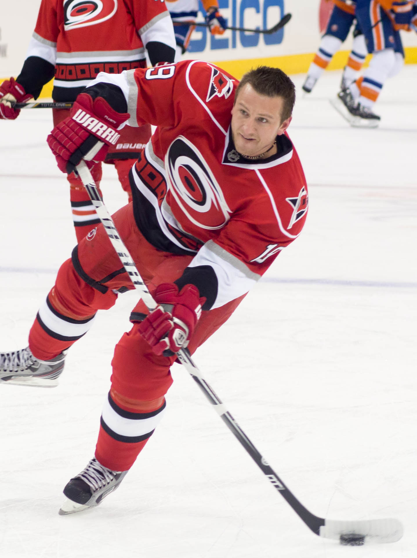 Jiří Tlustý, Czech ice hockey player